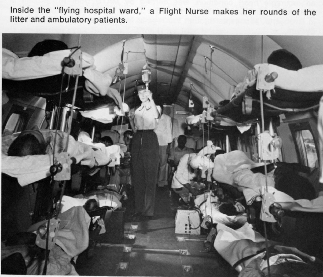 Intérieur d'un avion de transport médical C-131A Samaritan du Military Air Transportation Service.